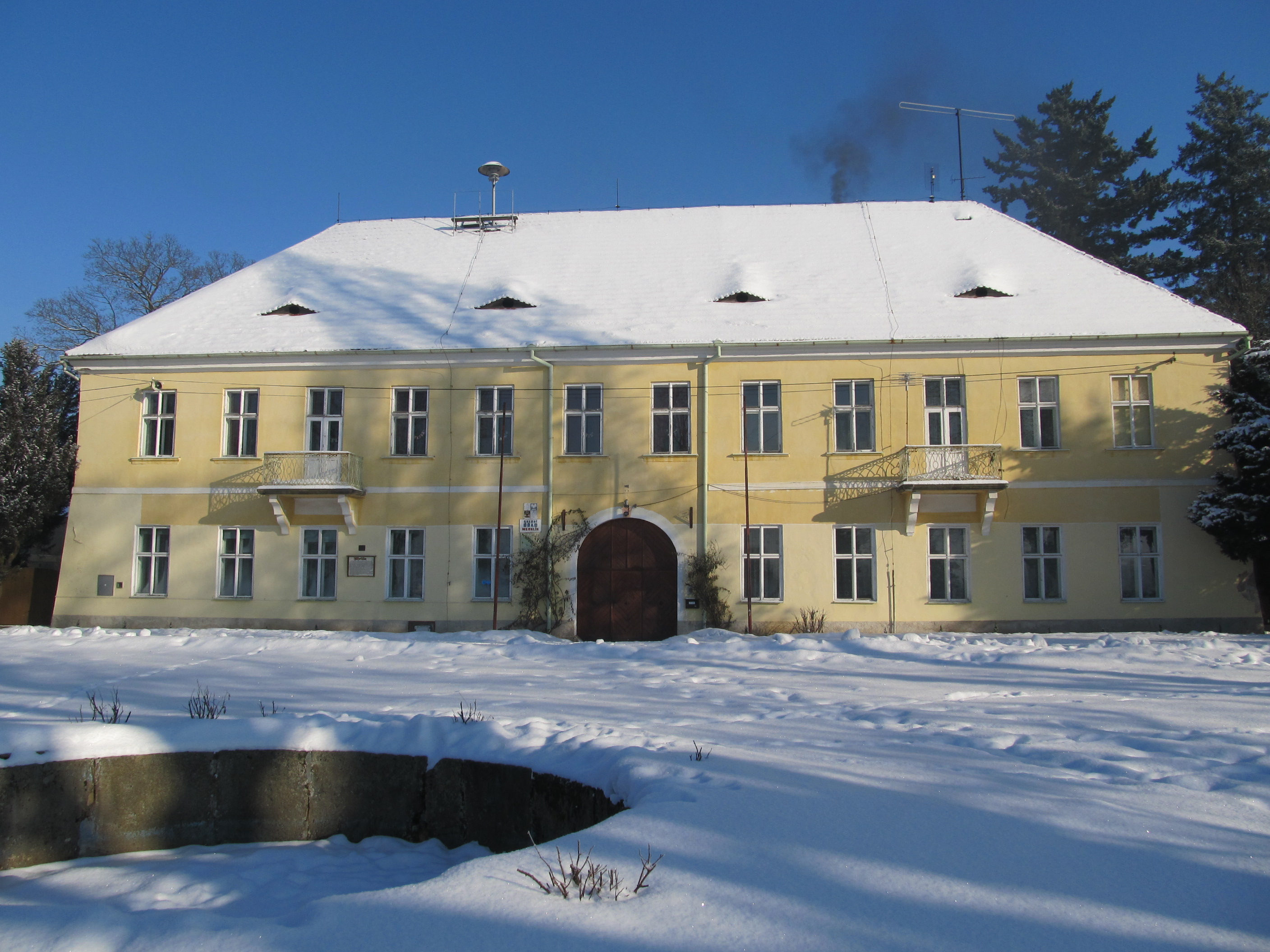 Merklín - zámek